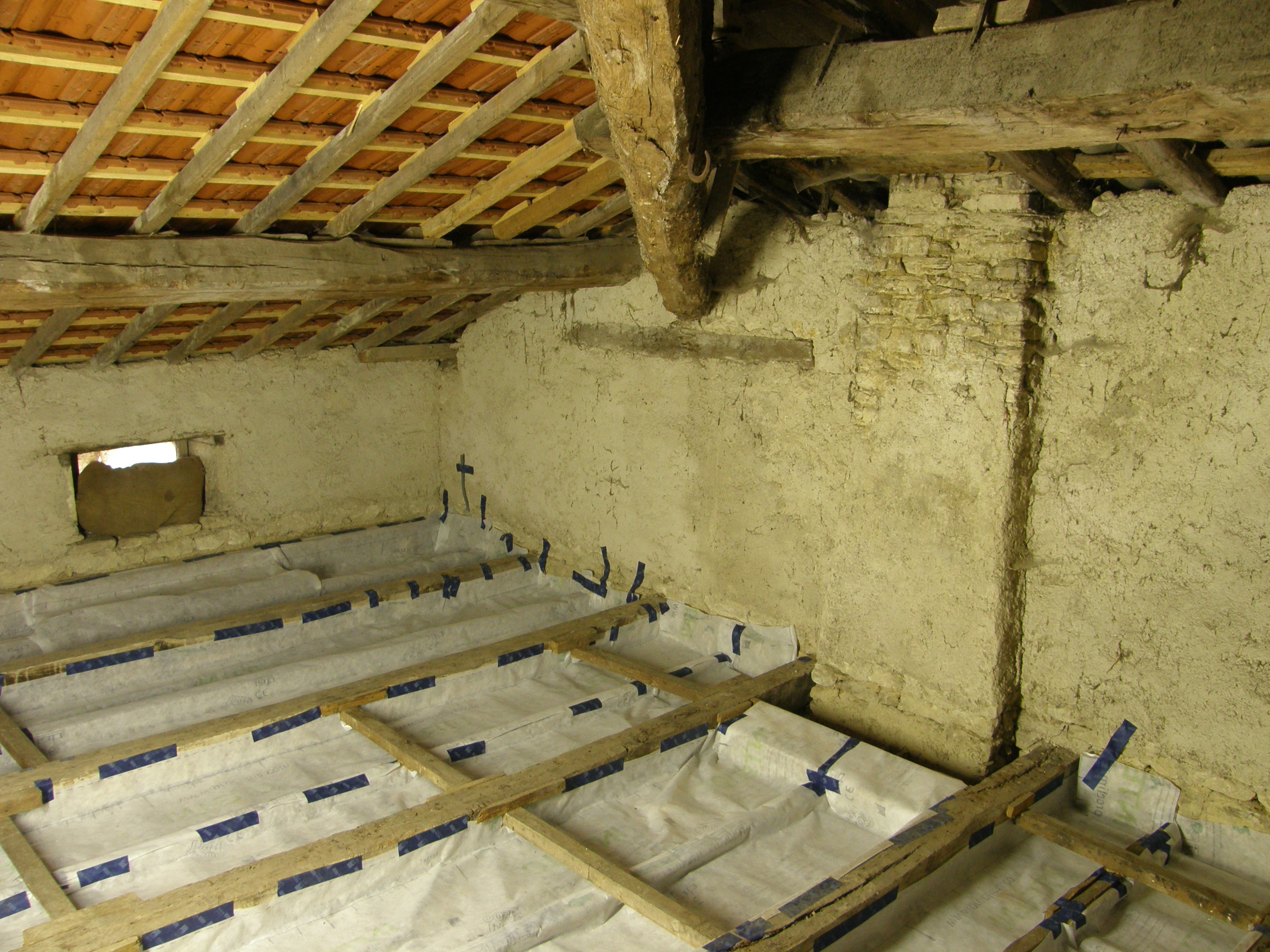 Pose du freine-vapeur (norme DIN EN 13984). Grenier d'une maison construite en 1840, et renovée après la Première guerre mondiale, dans le Nord de la Meuse (France).